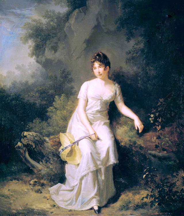 Ekaterina Golovkina (Naryshkina)